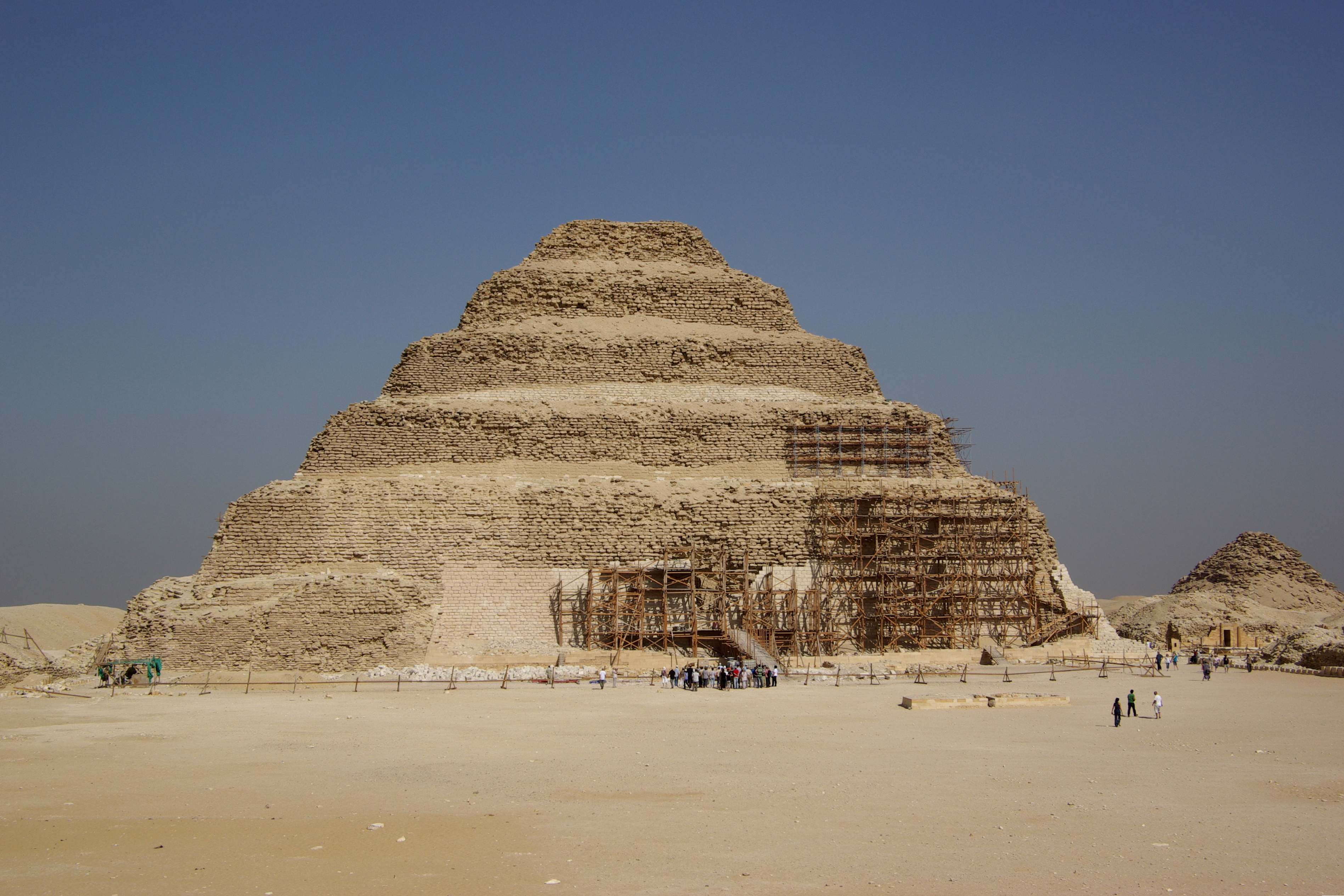 Ägypten, Sakkara, Stufenpyramide